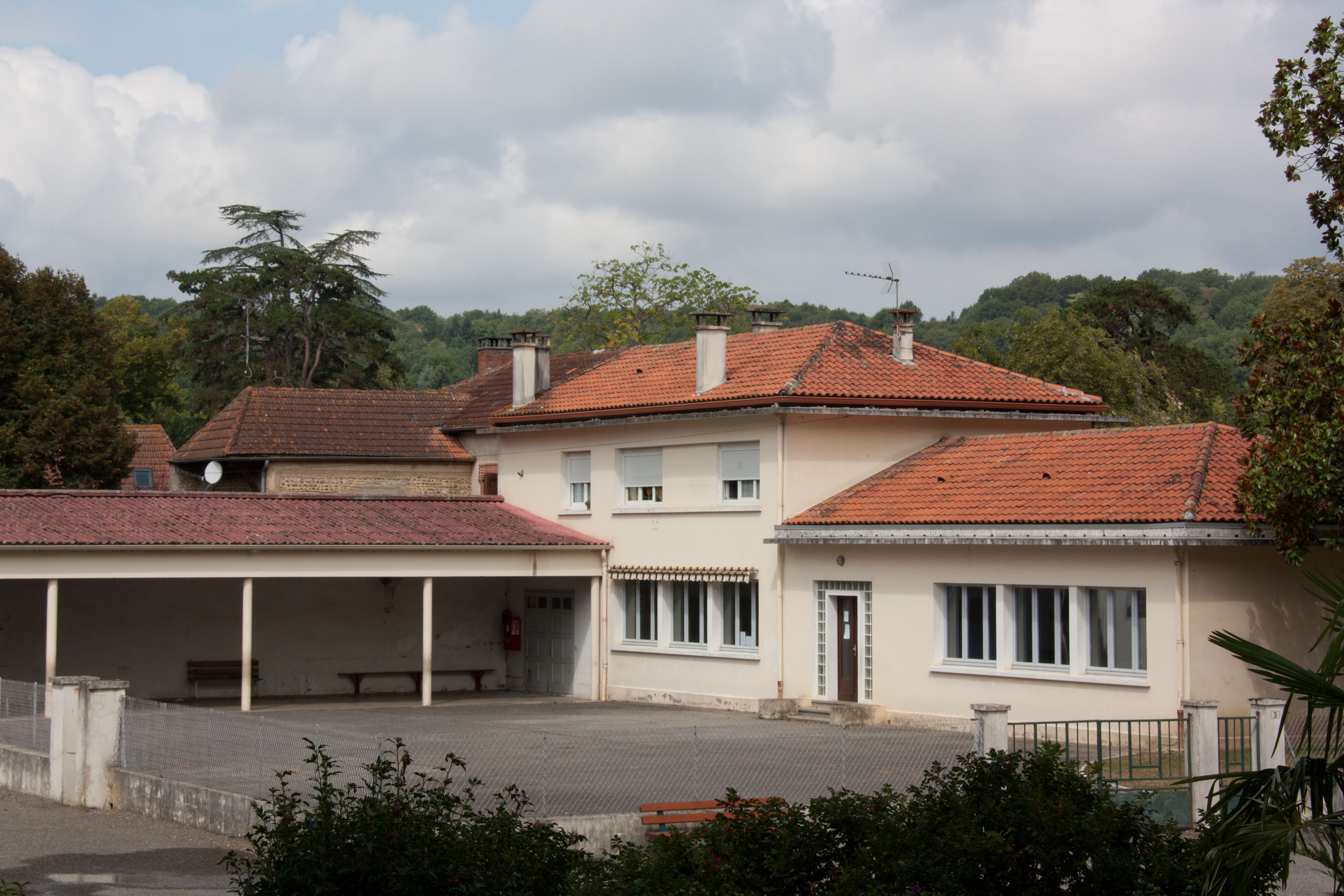 Ecole de Sombrun, Sombrun, Hautes-Pyrénées, France